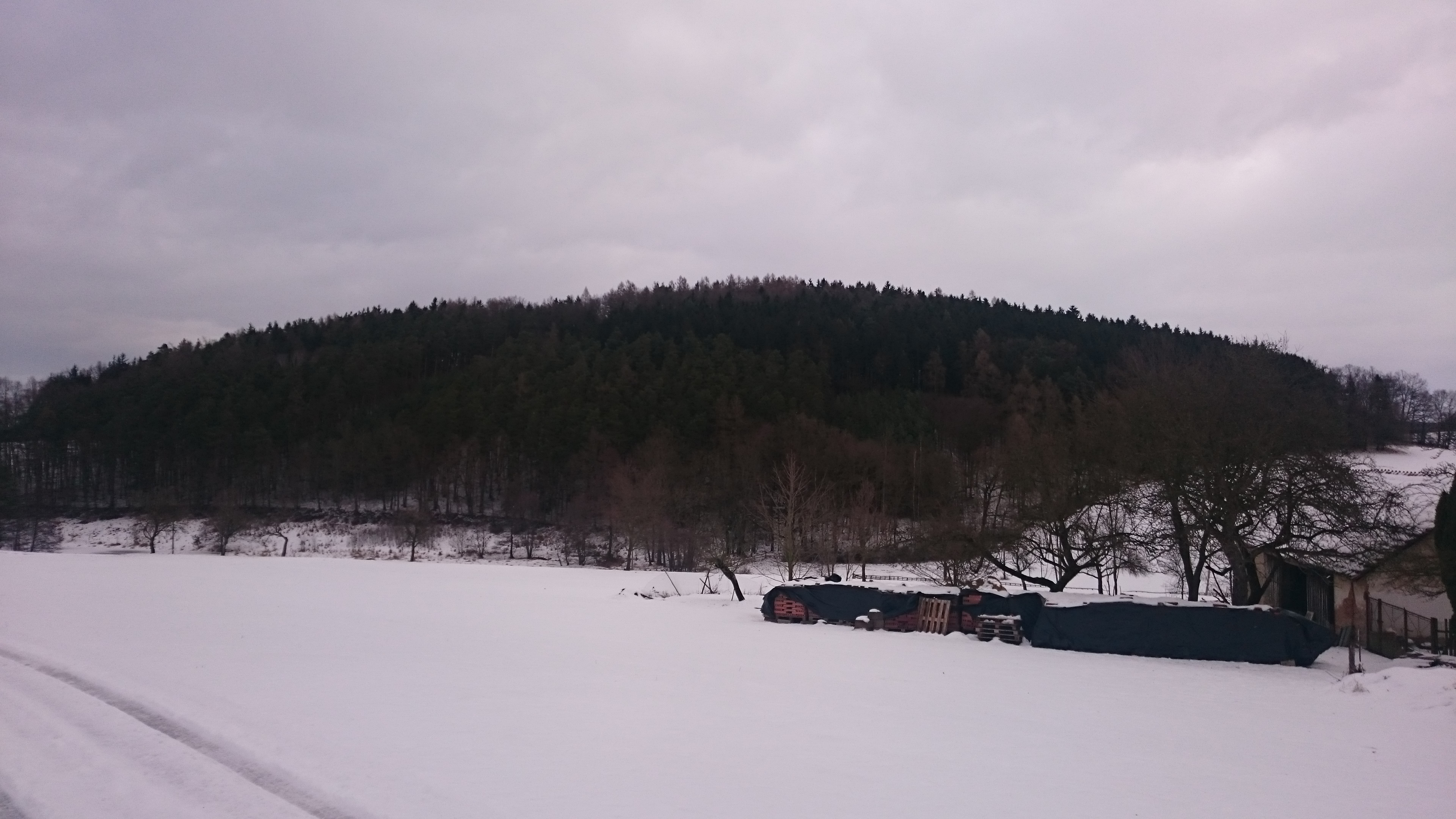 Hůrecká věž (446 m) u Struhařova. Okres Benešov, Česká republika.